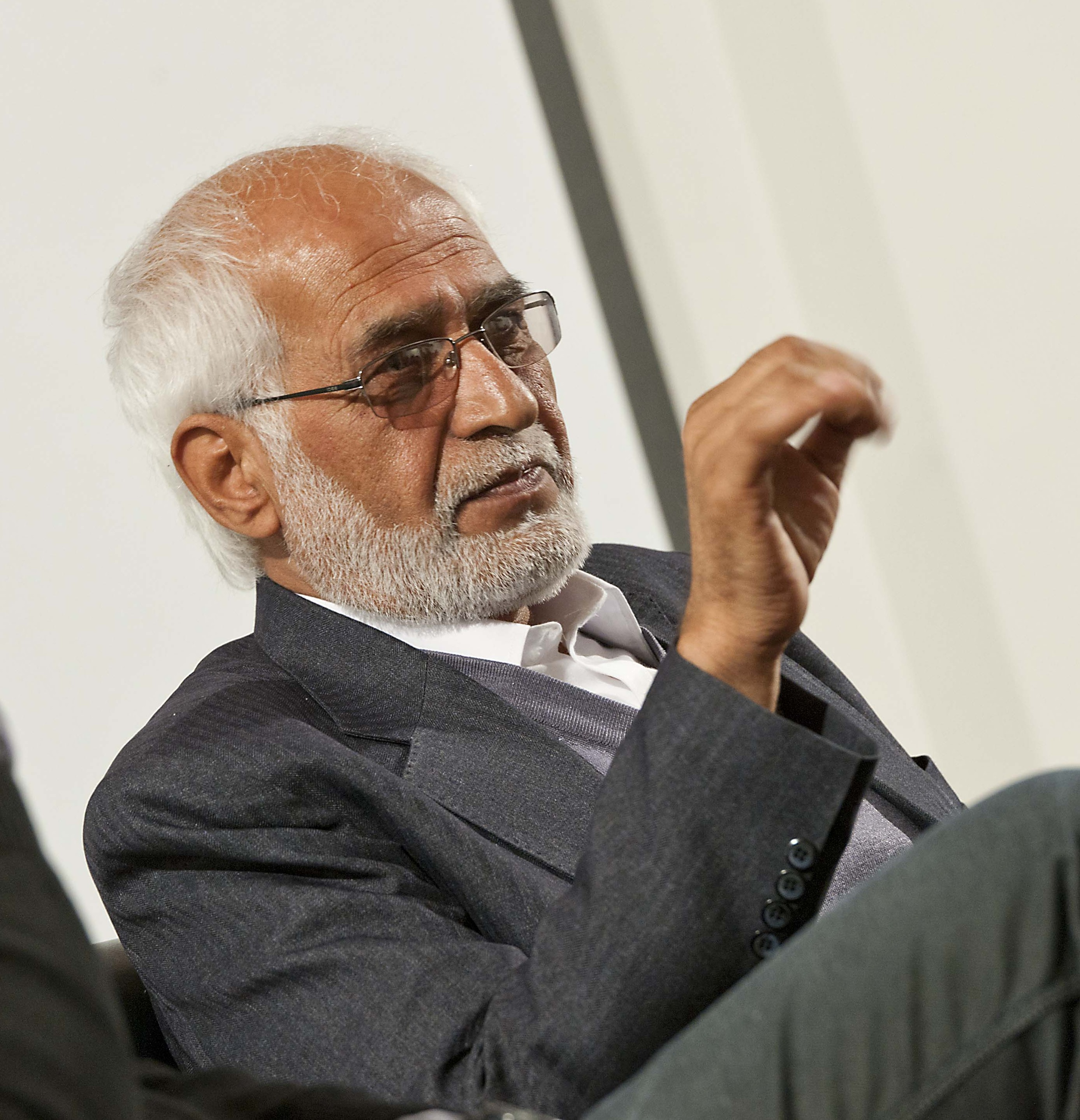 Direktør for Nationalmuseet Afghanistan i Kabul Omar Massoudi